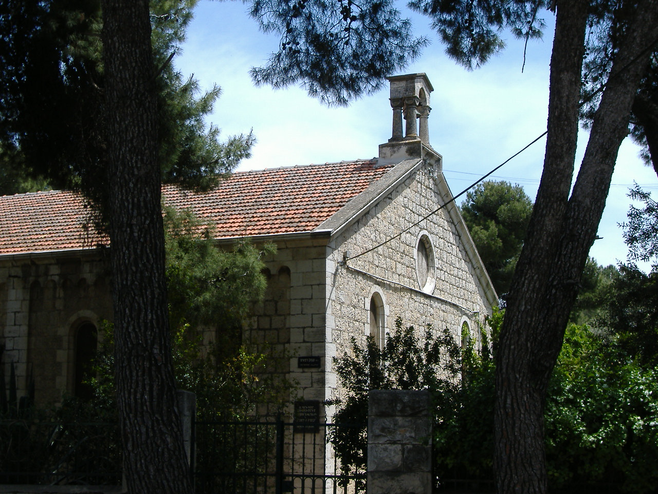 בית העם הטמפלרי.